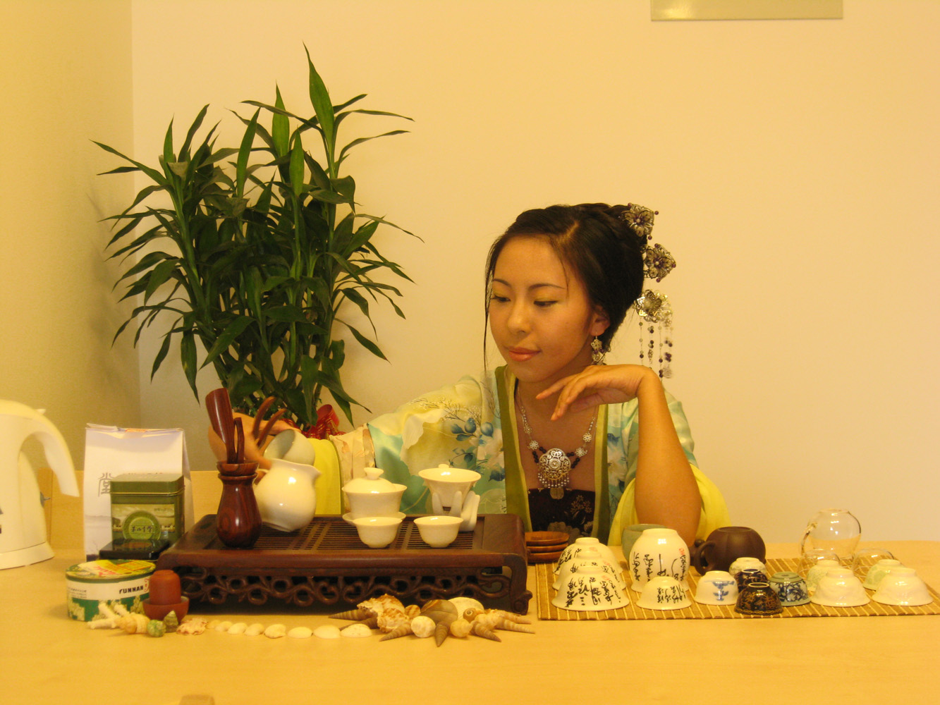 某人的汉服生活照。